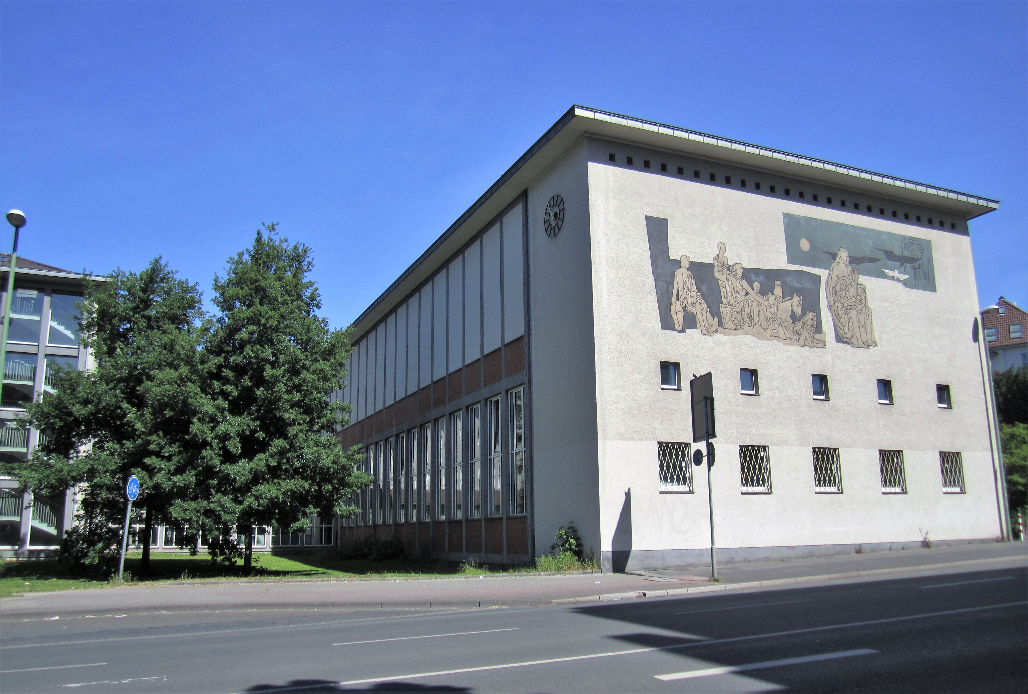 Denkmalgeschützte Schule in Hagen-Mitte, Voswinckelstraße 1. Ricarda-Huch-Gymnasium; erbaut 1952–1954, Anbau 1992. Bauherr: Stadt Hagen. Viergeschossiger Flügelbau, U-förmiger Grundriss, Glasgang zur Turnhalle (Foto) mit darüberliegender Aula. An der Außenfront der Aula befindet sich seit 1957 ein Sgraffito mit Mosaikeinlage (5 x 13 m) von Robert Pudlich. This is a photograph of an architectural monument.